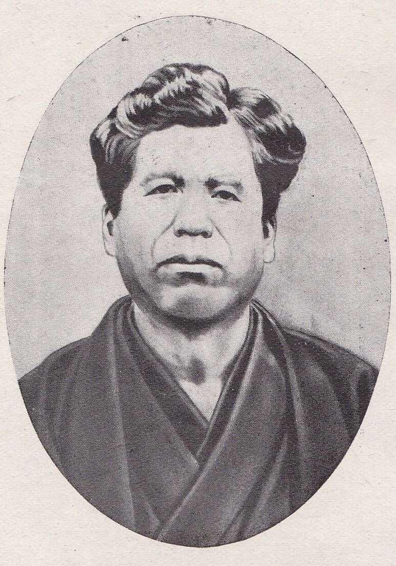 鎌田景弼自画像